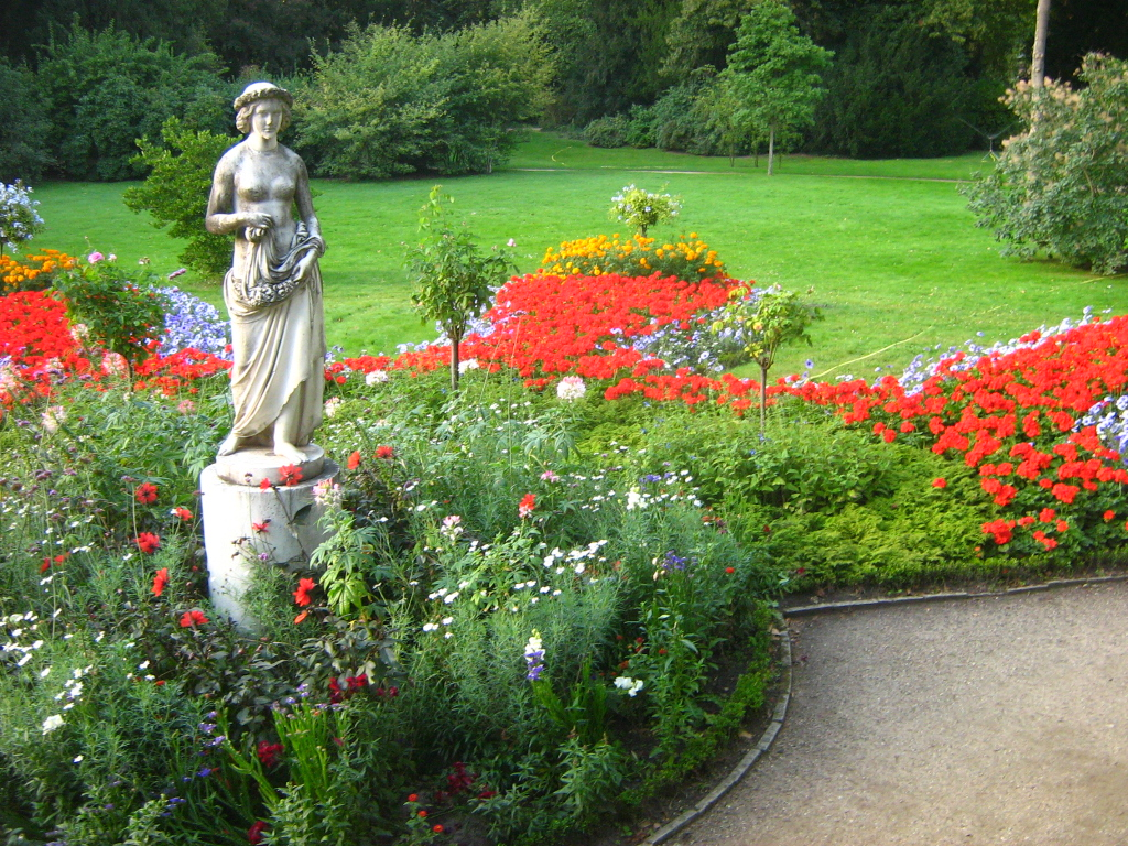 Der Marlygarten hinter der Friedenskirche im Park Sanssoucie in Potsdam (Brandenburg). Statue der Flora, restauriert 2015